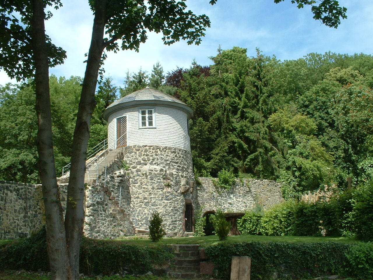 Restaurierter "Dörnbergtempel", ein ehemaliges Gartenhaus auf Resten eines ehemaligen Stadtturmes in Homberg (Efze)